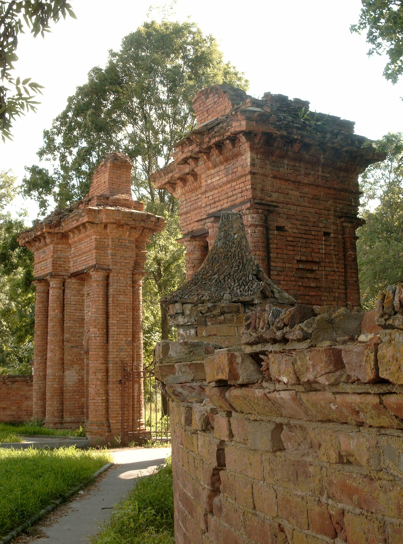 Беларуская (тарашкевіца): Былая сядзіба:фрагмэнты агароджы. в. Падароск This is a photo of Belarusian heritage monument. Reference number: 412Г000113 ( WLM)